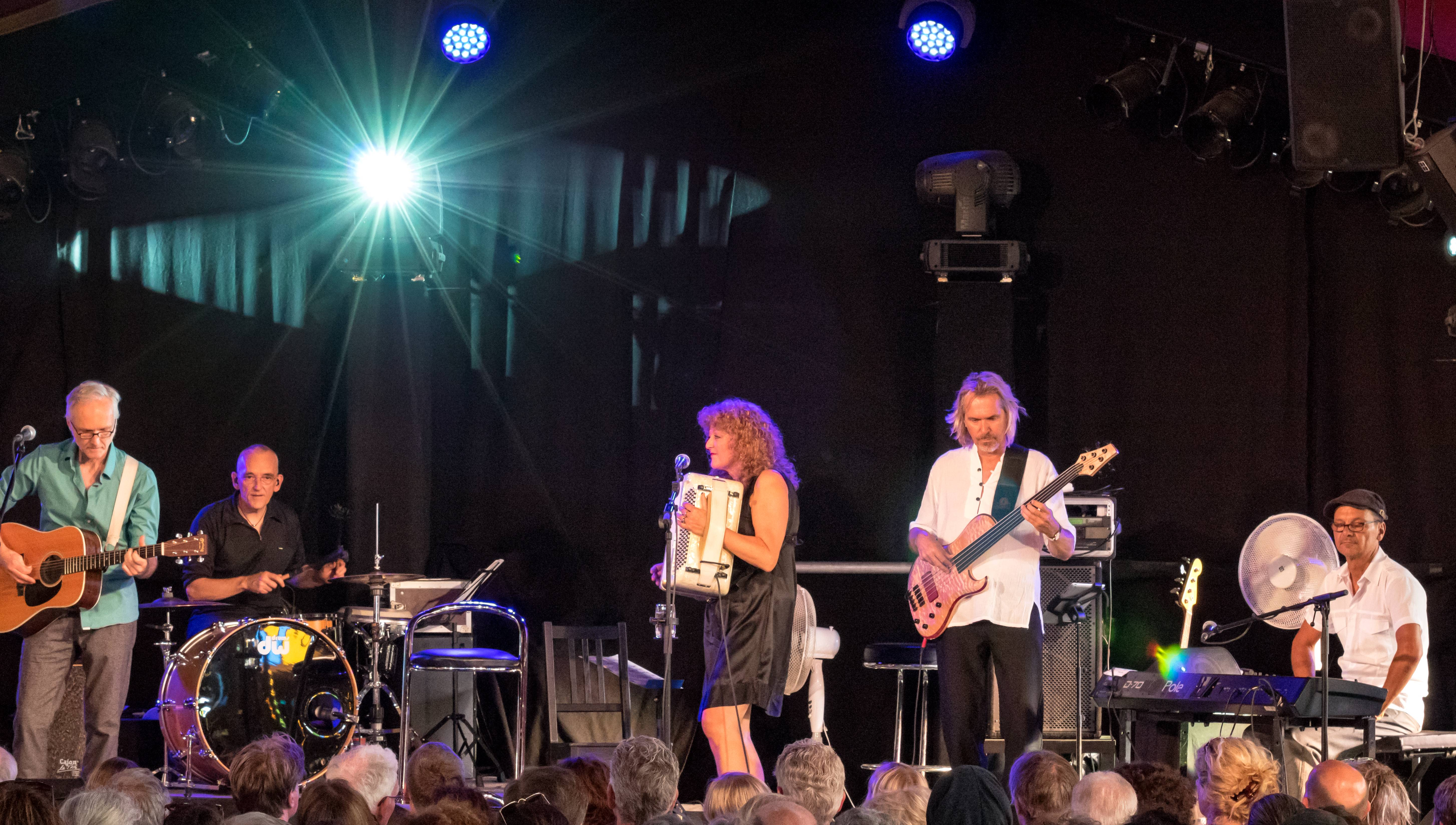 Bilder vom ZMF 2015, die Gala Florian Städtler am 15. Juli 2015